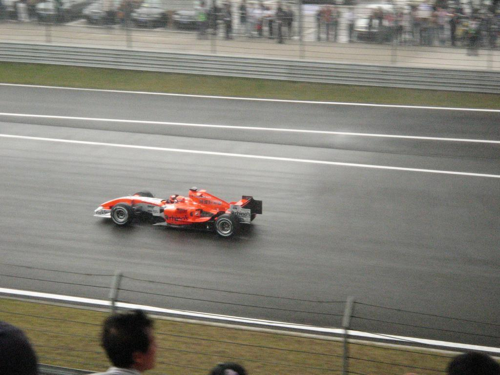 MidlandF1 (Spyker), China 2006